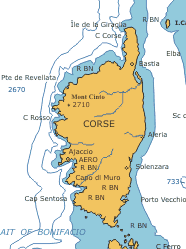 Valery Kulaga